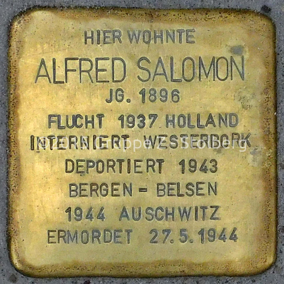 Stolperstein für Alfred Salomon verlegt am 18. Dezember 2015